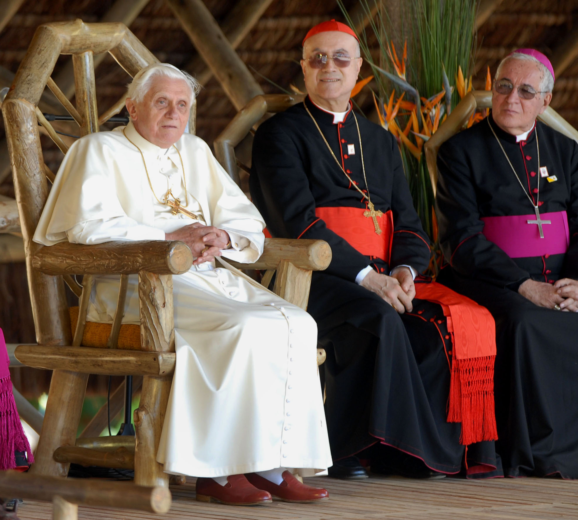 Papa Bento XVI visita a "Fazenda Esperança", local de recuperação de dependentes químicos localizado na zona rural de Guaratinguetá, São Paulo, Brasil.